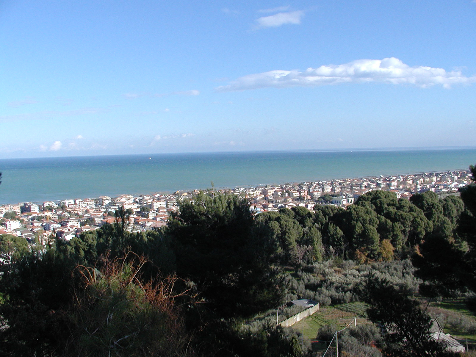 Francavilla al Mare vom Berg aus gesehen